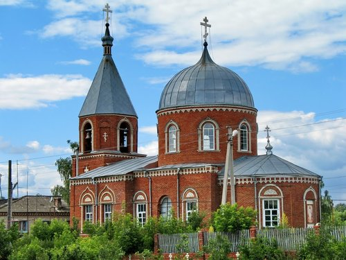 Церковь